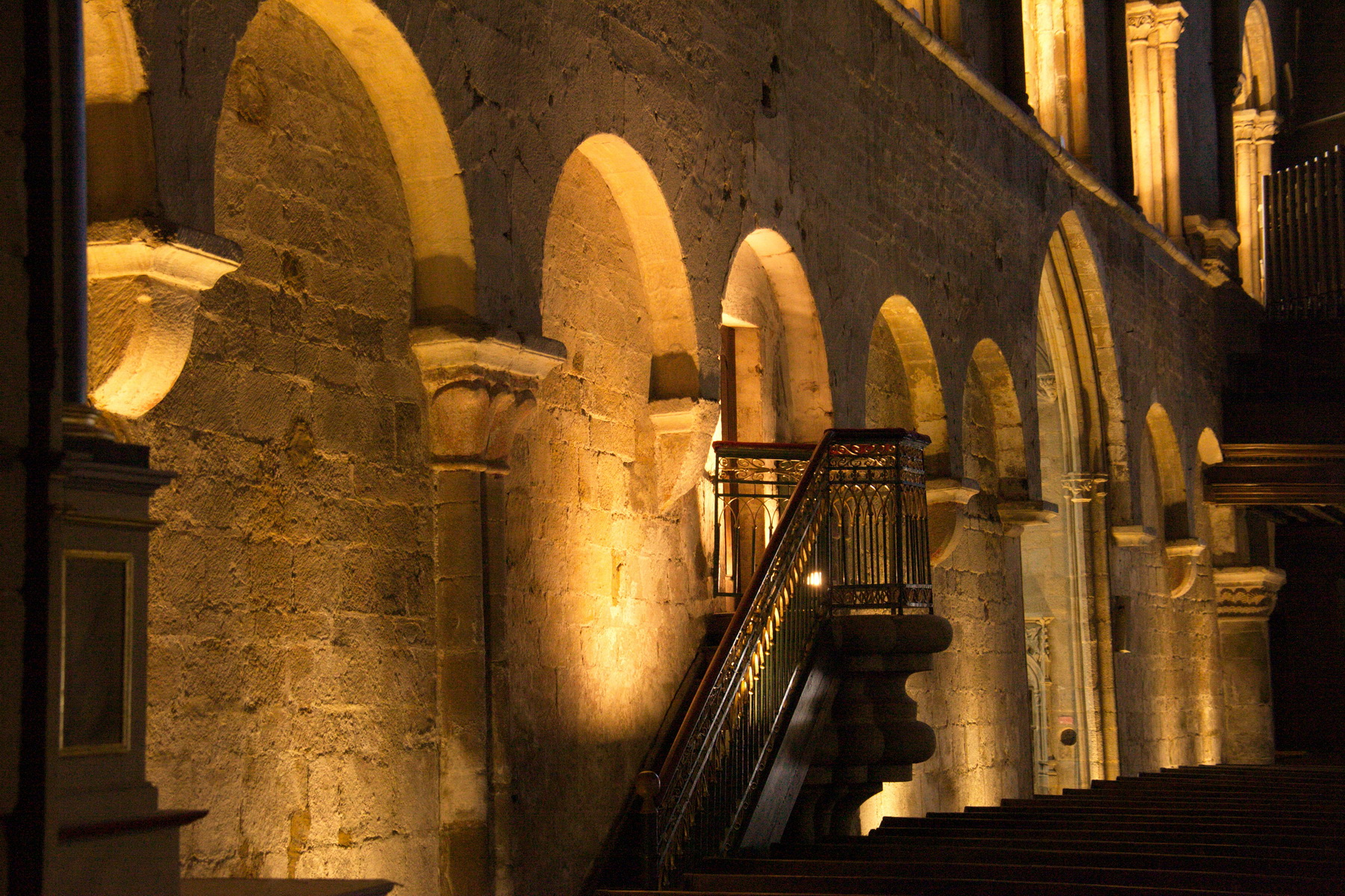 Basilique Saint-Sauveur (Classé) .